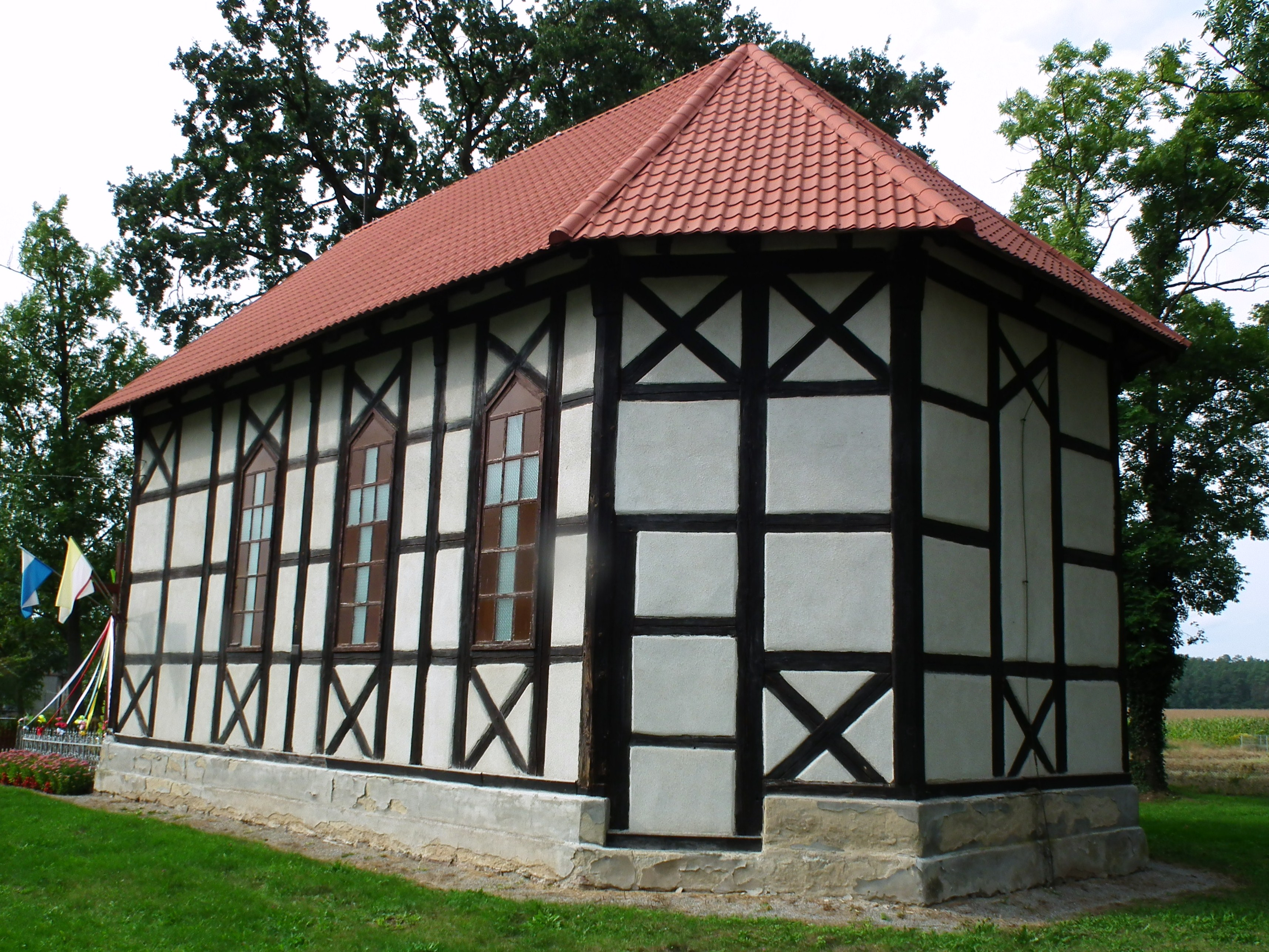 Kościół MB Częstochowskiej w Grabowie w gm. Torzym.